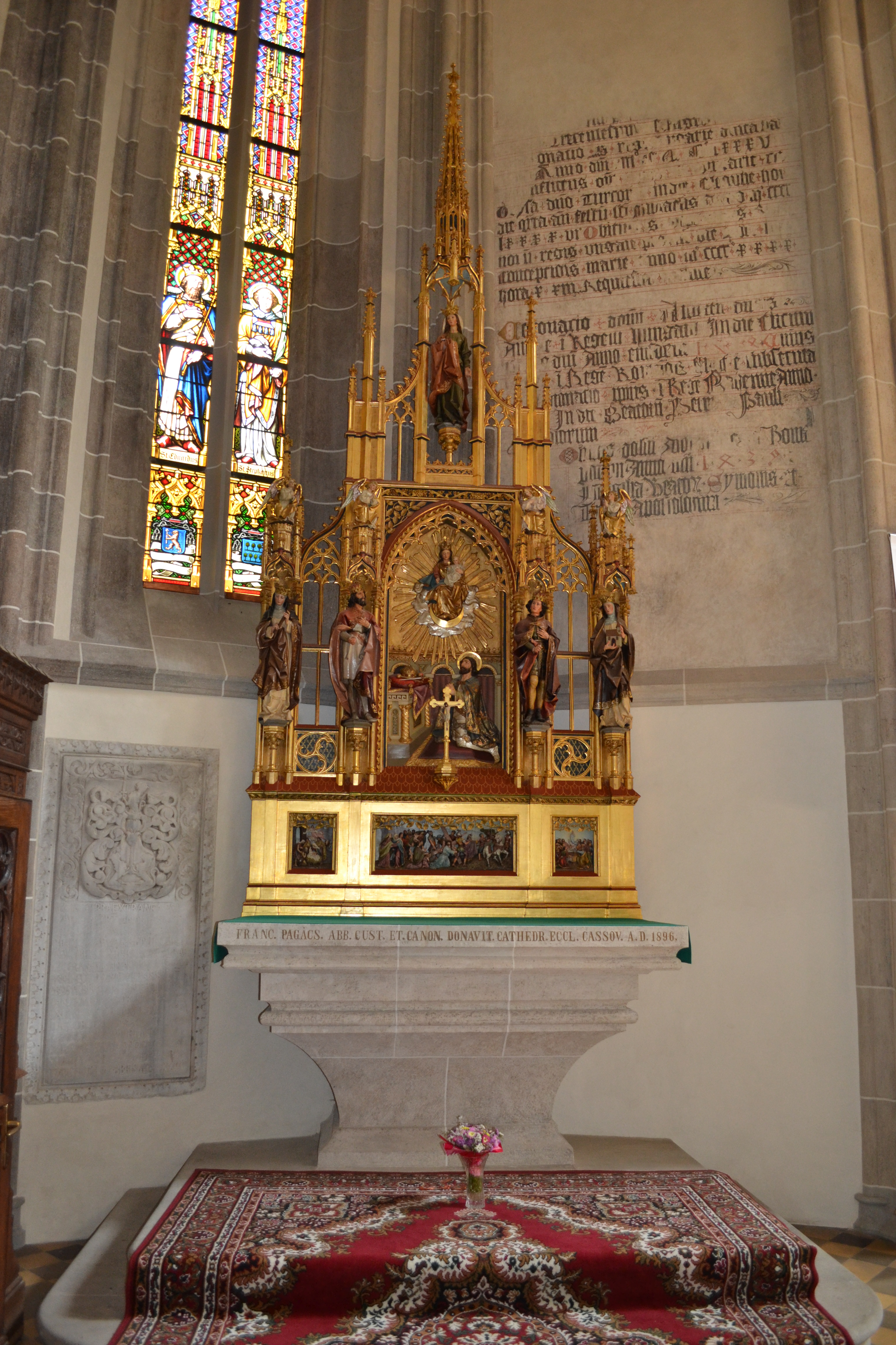 Oltár svätého Štefana kráľa v Dóme sv. Alžbety. Dómu ho v roku 1896 venoval košický kanonik František Pagáč. Vyhotovil ho tirolský rezbár Ferdinand Stufflesser. Je umiestnený v severnej bočnej lodi nad kryptou Františka II. Rákociho